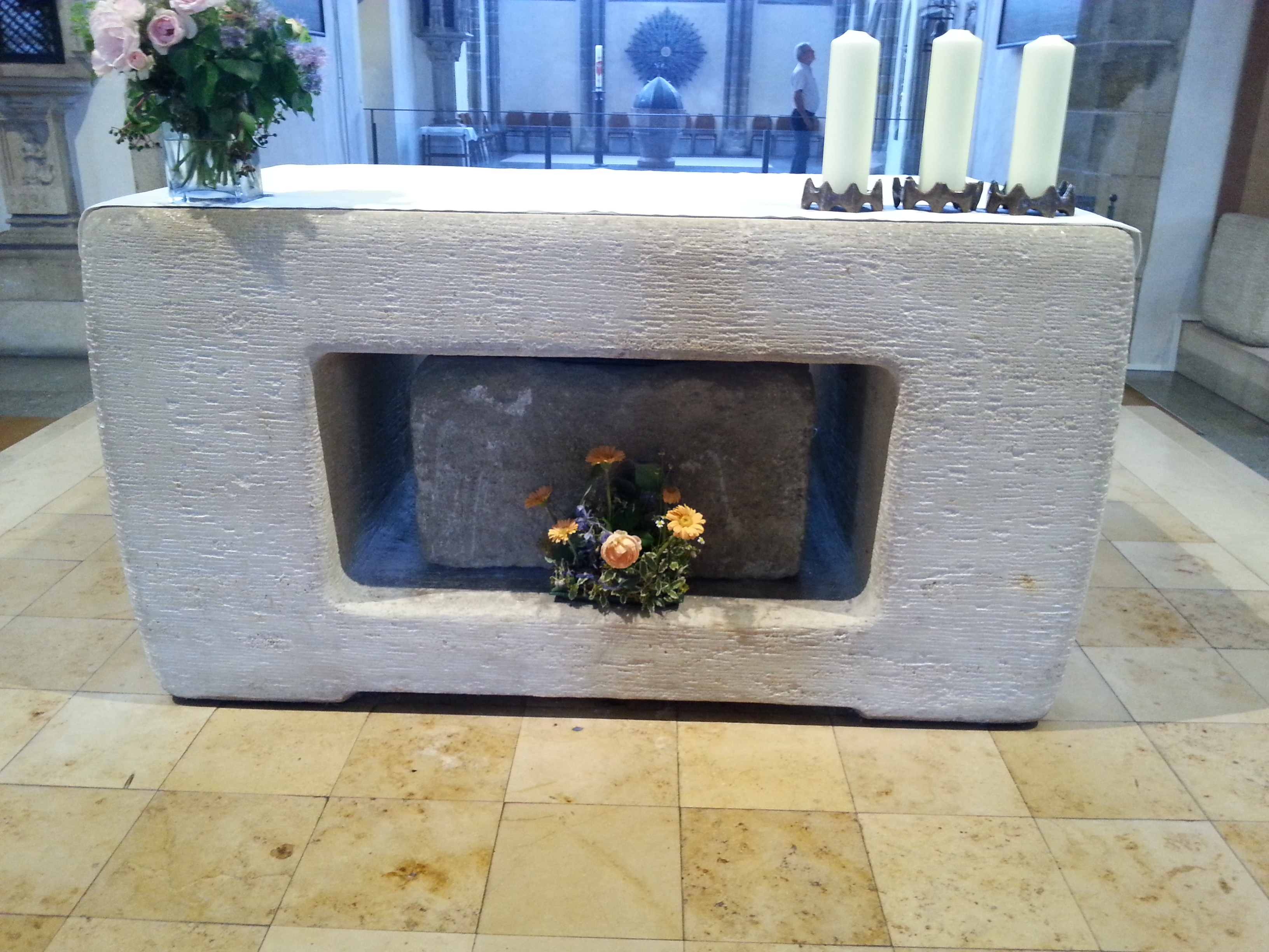 Hauptaltar mit Ossuar in der Basilika St. Laurentius in Enns/Lorch (A). In ihm werden Gebeine aus der Spätantike (4. bis 5. Jahrhundert) aufbewahrt, mutmaßlich die der Gefährten des Heiligen Florian von Lorch, der in Enns den Märtyrertod erlitt.